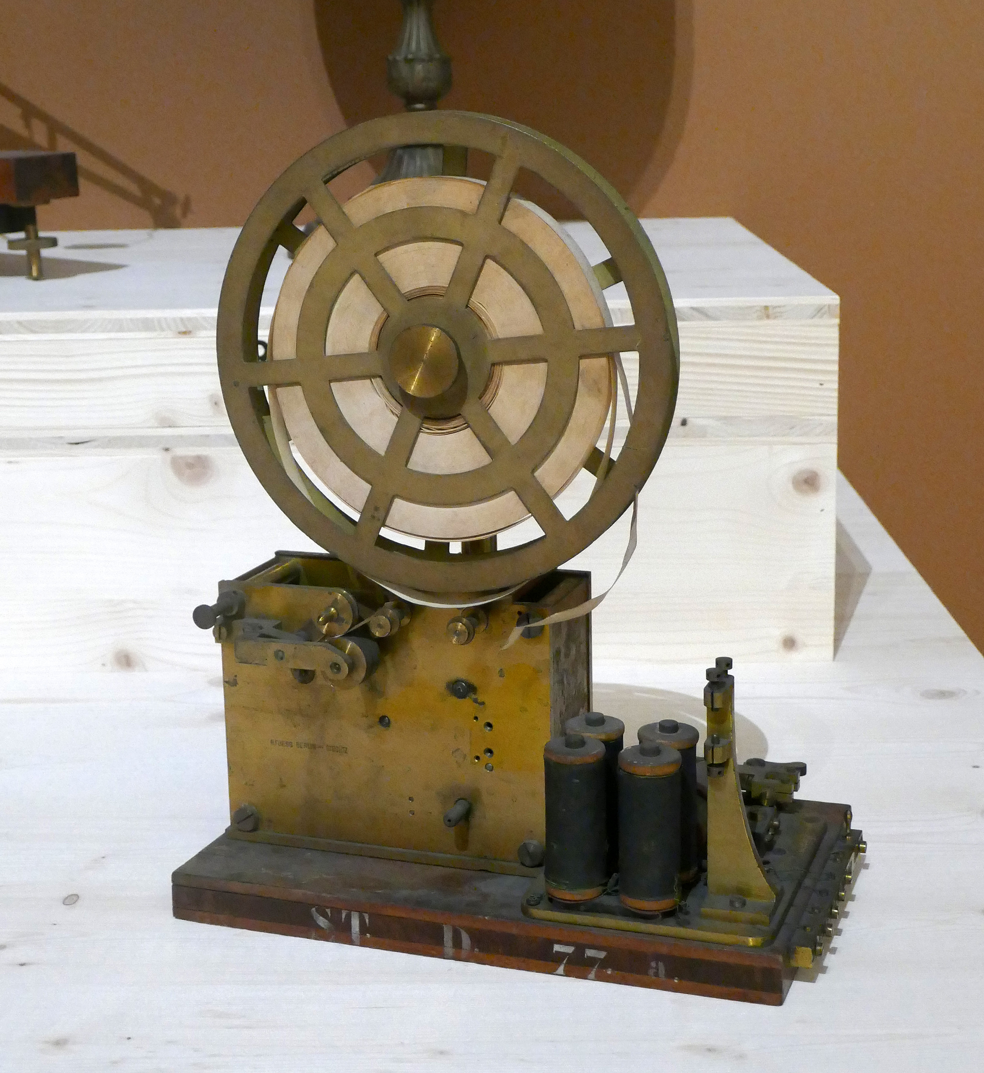 Rudolf Fuess. Chronographe. 4e quart du 19e s. Laiton, cuivre, papier. Collection de l'Observatoire astronomique de Strasbourg. Exposition Laboratoire d'Europe Strasbourg, 1880-1930 au Musée d'art moderne et contemporain de Strasbourg.